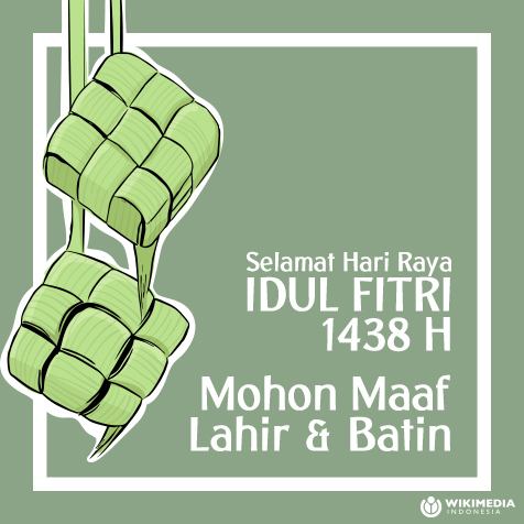 Selamat hari raya Idul Fitri 1438 H - Mohon maaf lahir dan batin